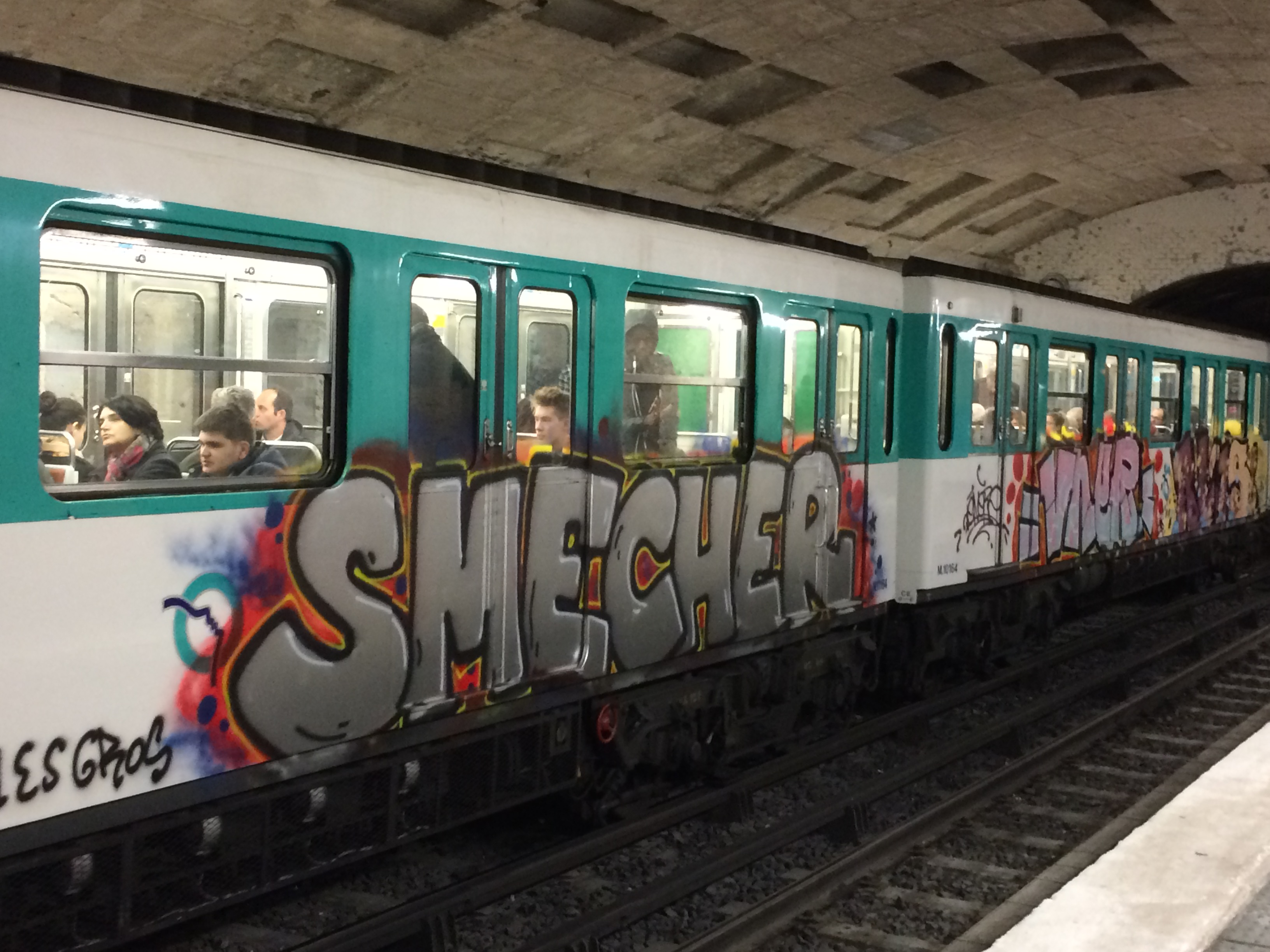 Métro de type MF 67 graffé probablement à la station Volontaires